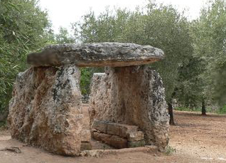 Dolmen di Montalbano di Fasano Licensing Categoria:Immagini esclusivamente in GNU FDL